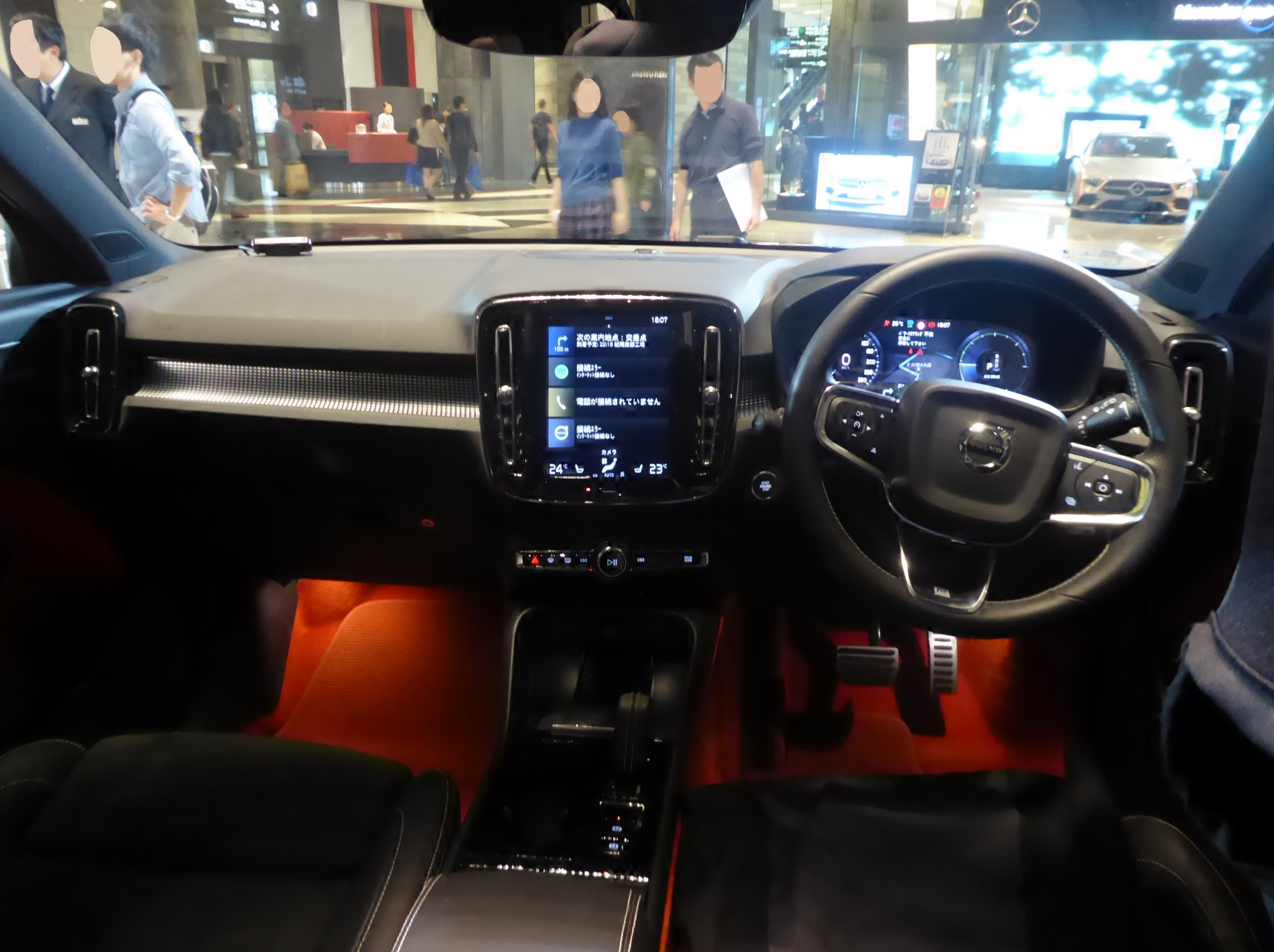 DBA-XB420XC型ボルボ・XC40 1stエディションのインテリアを撮影。